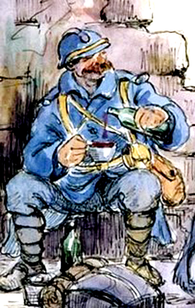 Poilu et sa bouteille de pinard